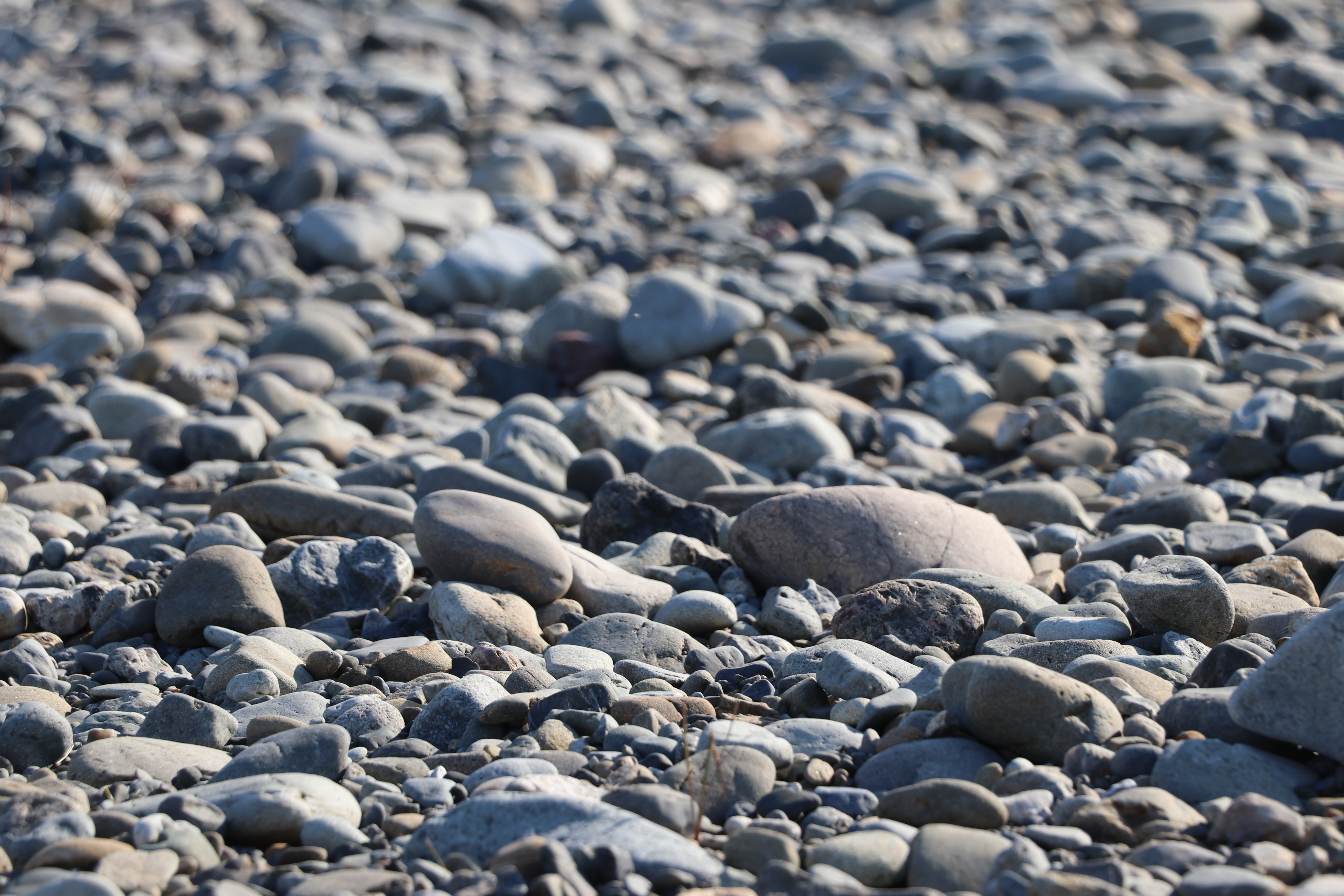 多摩川河川敷に見られたインブリケーション。流向は画像右から左で、2019年台風18号による多摩川増水によって形成された、